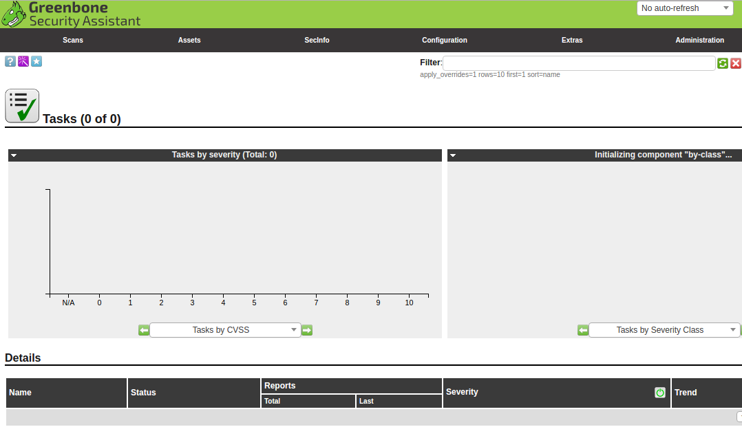 Openvas 9.0